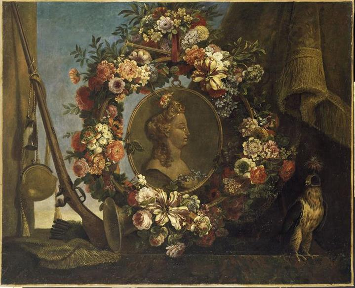 Nature morte avec le profil de Diane, château de Versailles, par Blin de Fontenay. Toile placée dans la petite galerie suspendue de Meudon.